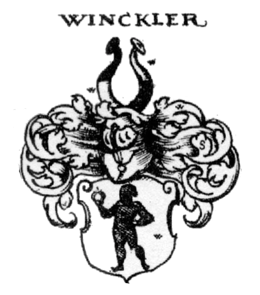 Wappen der Nürnberger Adelsfamilie Winkler von Mohrenfels